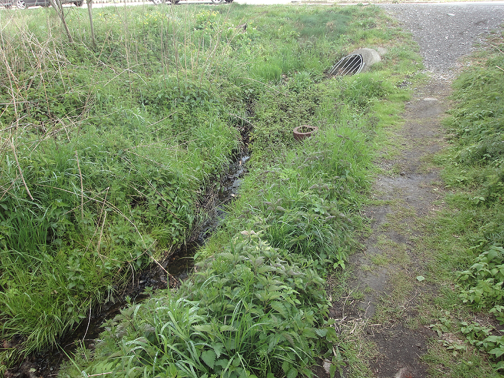 Quellaustritt des Strothbachs bei Bielefeld-Dalbke